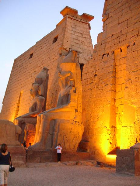 Templo de Luxor, estátuas de Ramsés II na entrada.